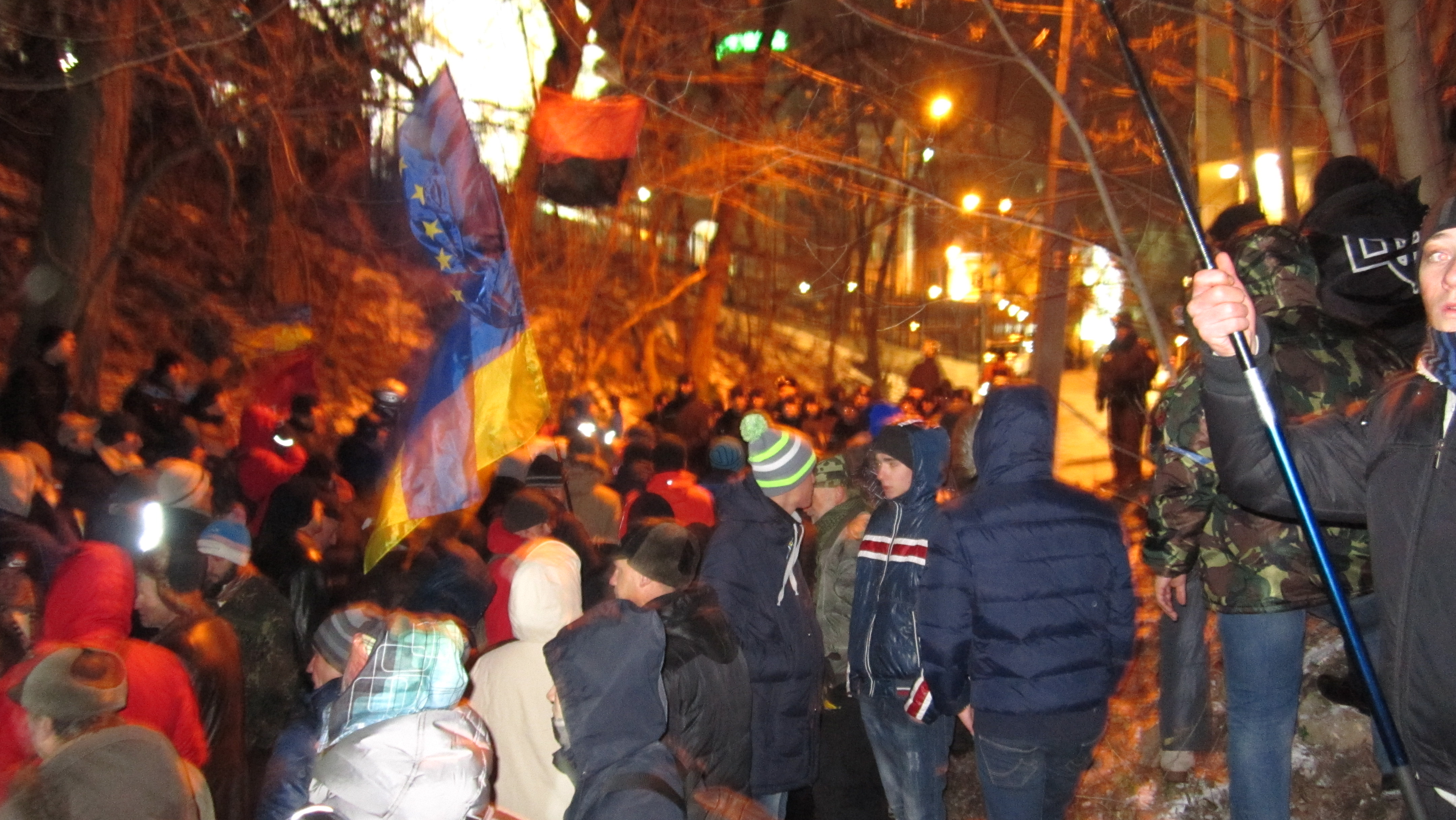 Пікетувальники Шевченківського районного суду міста Києва близько п'яти годин мерзли в яру урочища Гончарі разом з «Грифоном» і провокаторами (переодягненими службовцями спецпідрозділу «Беркут» тощо) вимагаючи звільнення журналіста Андрія Дзиндзі.